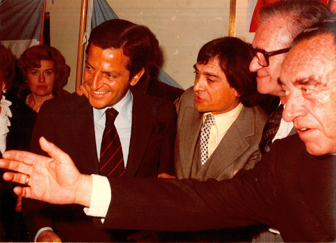 Fotografía tomada al ex-presidente del gobierno español Adolfo Suárez, durante su visita a Argentina efectuada en septiembre de 1981, en el Club Deportivo Español de Buenos Aires, acompañado por su amigo el empresario Esteban Romero Martín, natural de Villafranca de la Sierra (Ávila, España).